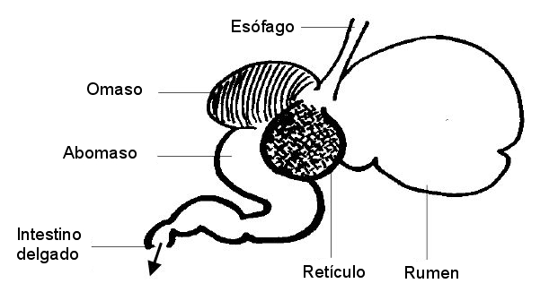 Esquema en el que se representa el aparato digestivo de los rumiantes y las diferentes cámaras que lo componen.